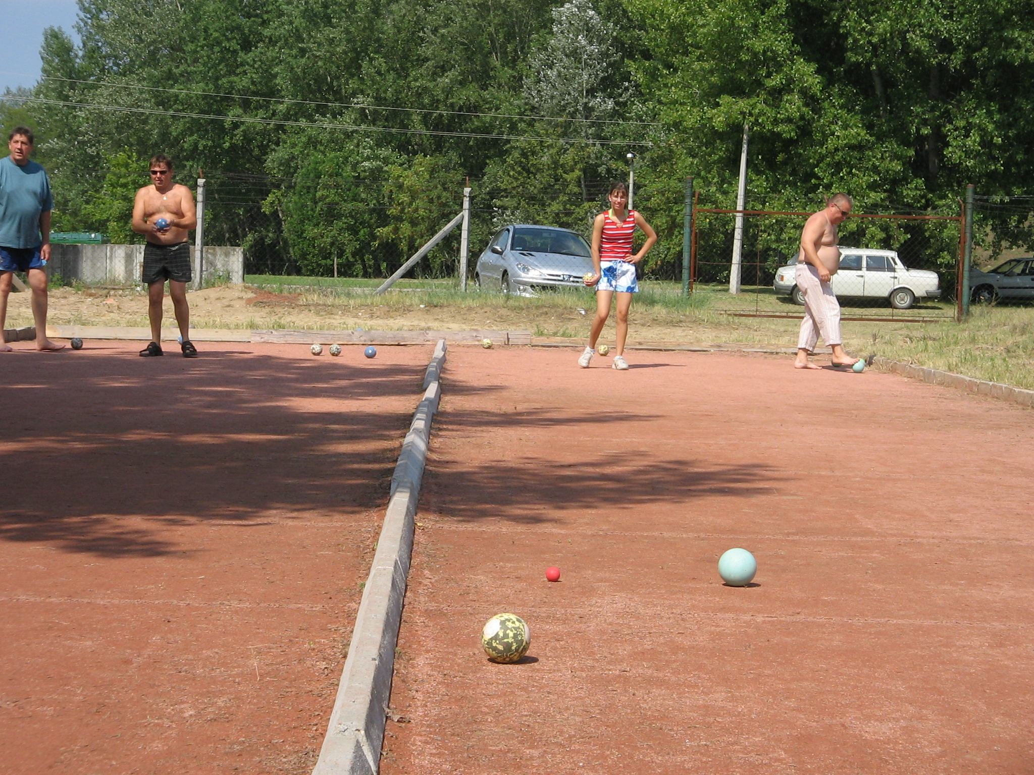 Játék salakos bocsapályán Pakson